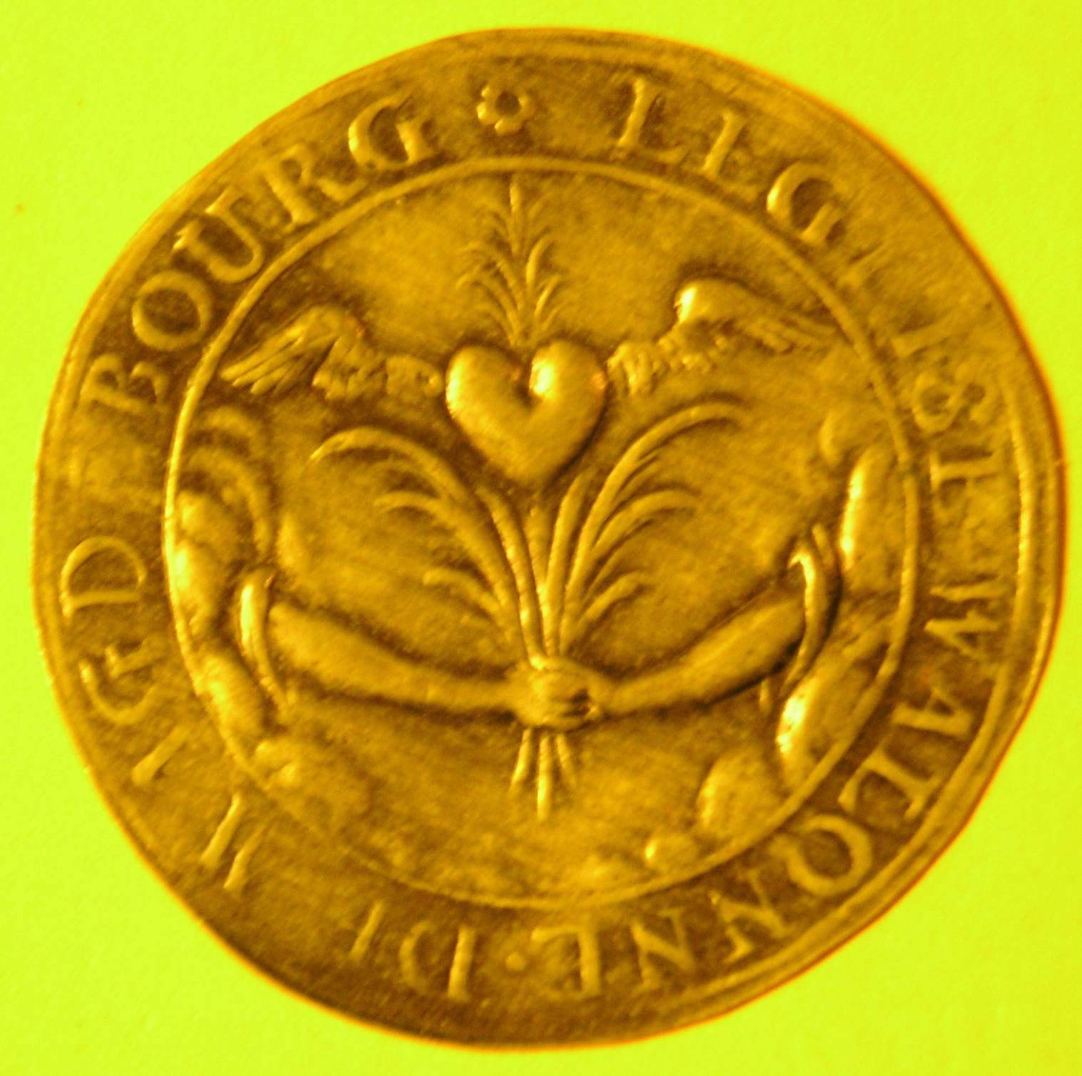 Abendmahlsmarke der wallonisch-reformierten Gemeinde in Magdeburg: Zwei in Eintracht ineinander gelegte Hände halten Palmzweige. Darüber ist ein beidseitig geflügeltes Herz dargestellt, dem ein Palmzweig entsprießt. Umschrift: LEGLISE WALONE DE MAGDEBOURG